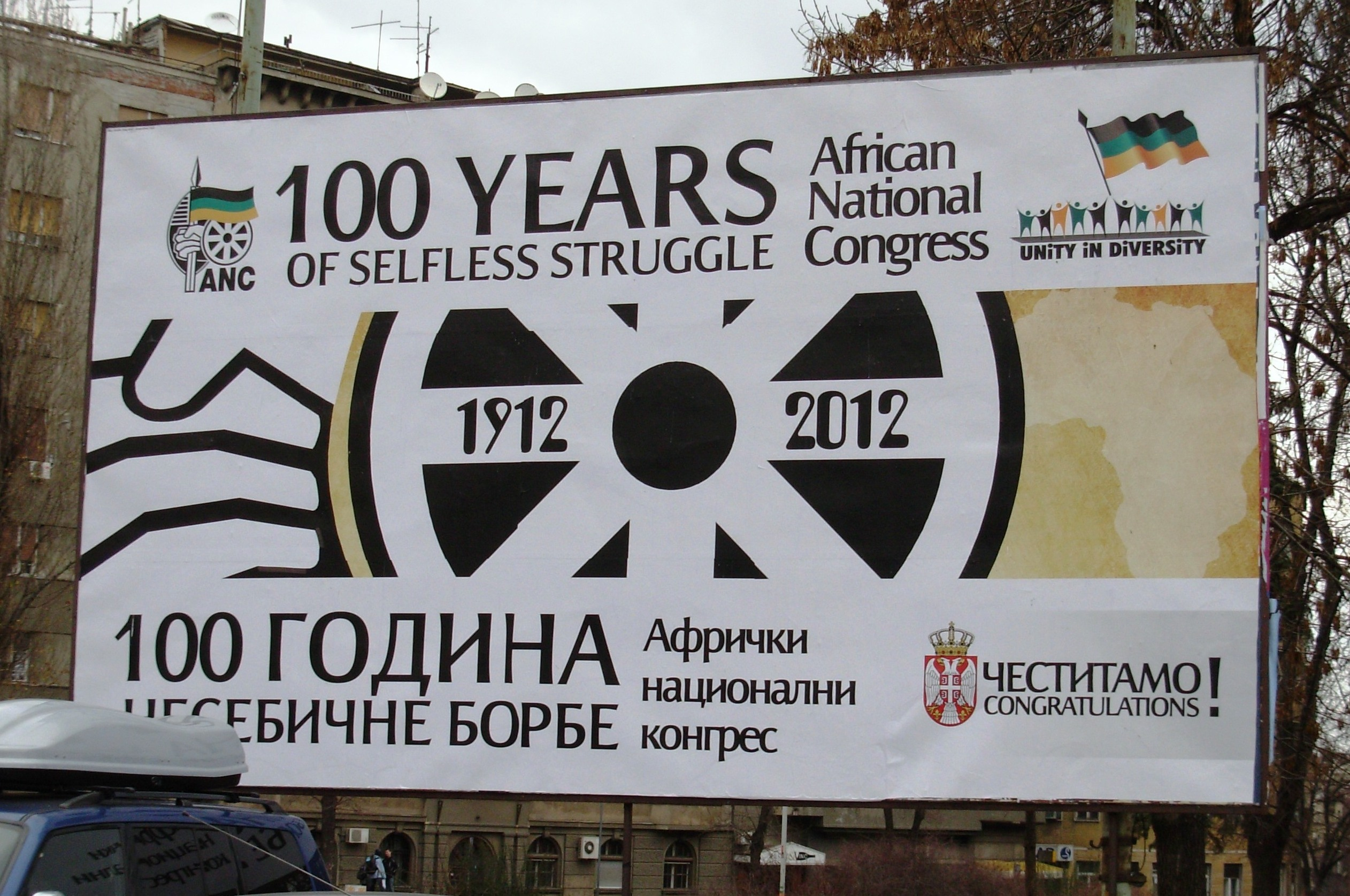 100 година Афричког Националног Конгреса, пано-честитка испред Скупштине Србије. Јануар 2012. Сликао Голдфингер.